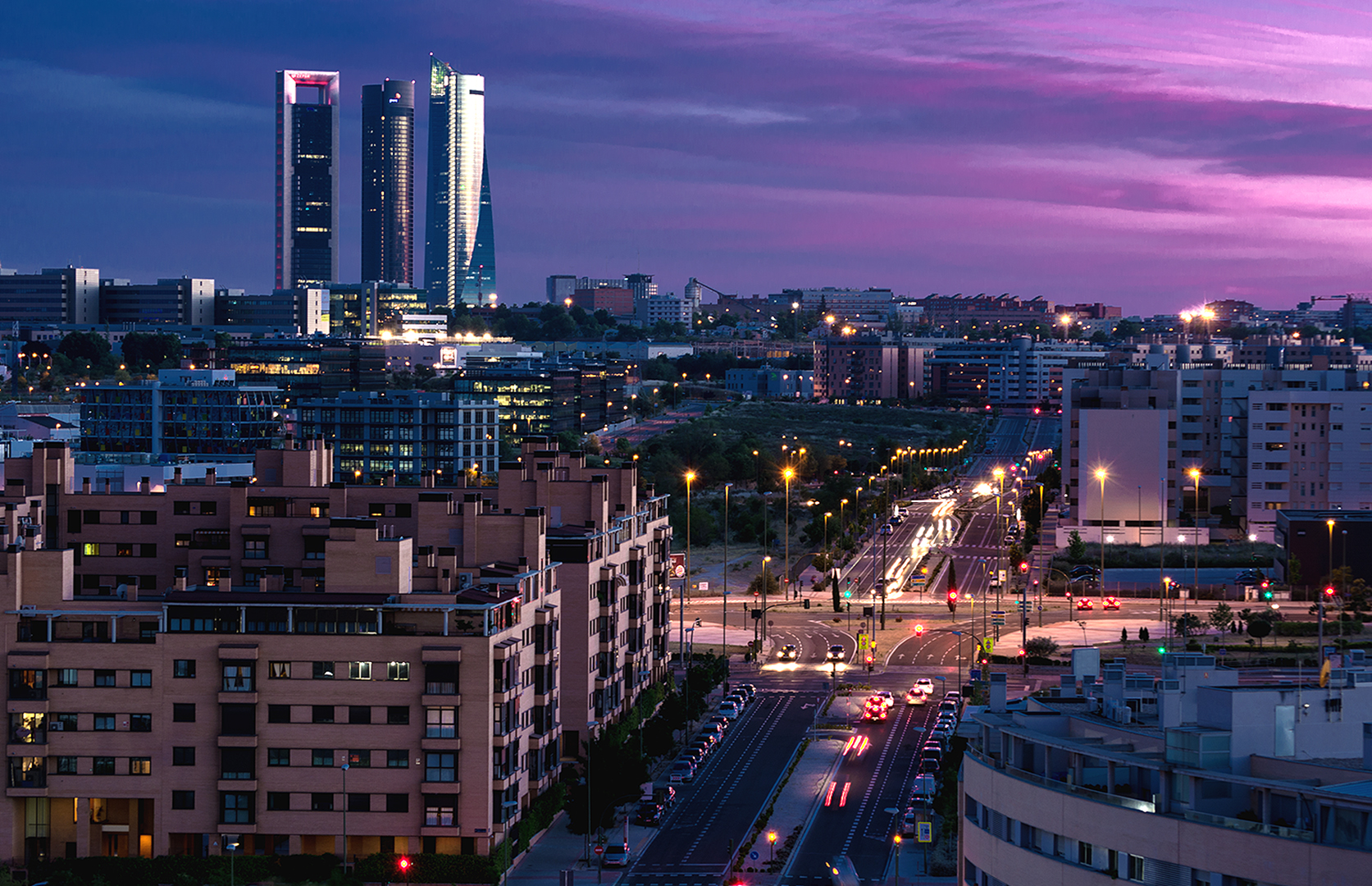 Anochecer en Las Tablas, Madrid, España.